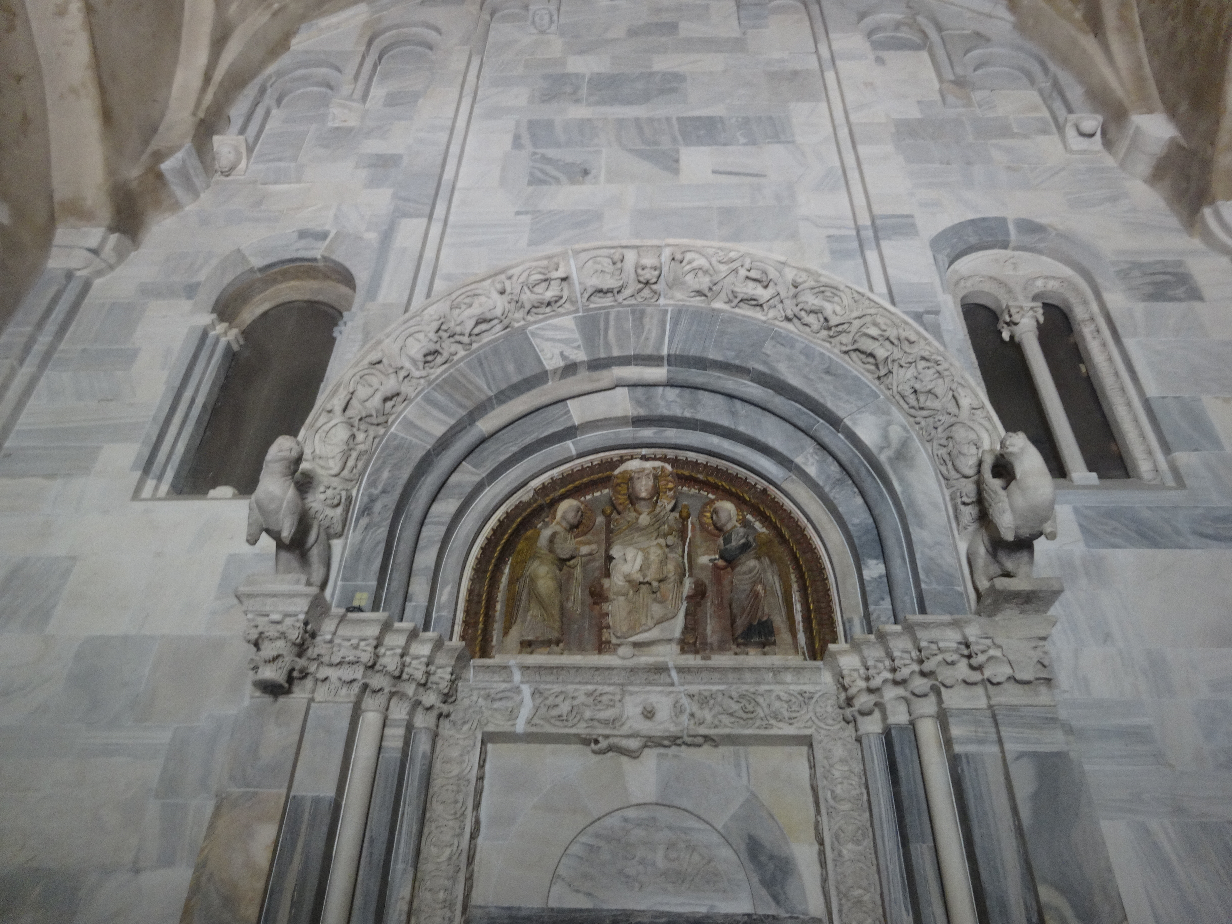 Манастир Студеница је један од највећих и најбогатијих манастира Српске православне цркве. Основао га је Стефан Немања 1190. године.